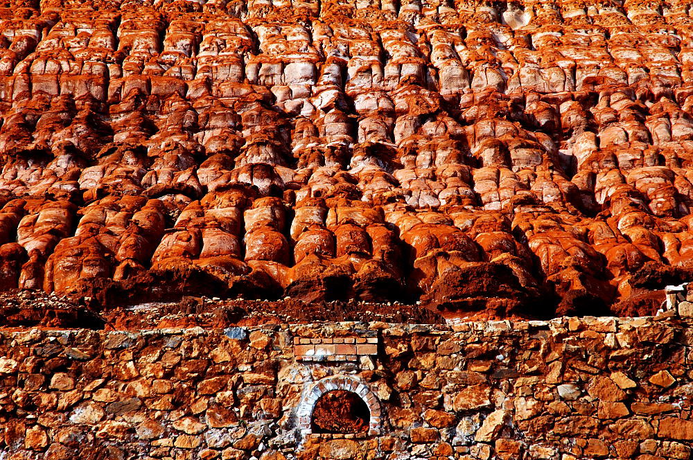 Iglesias, Sardegna, Italia